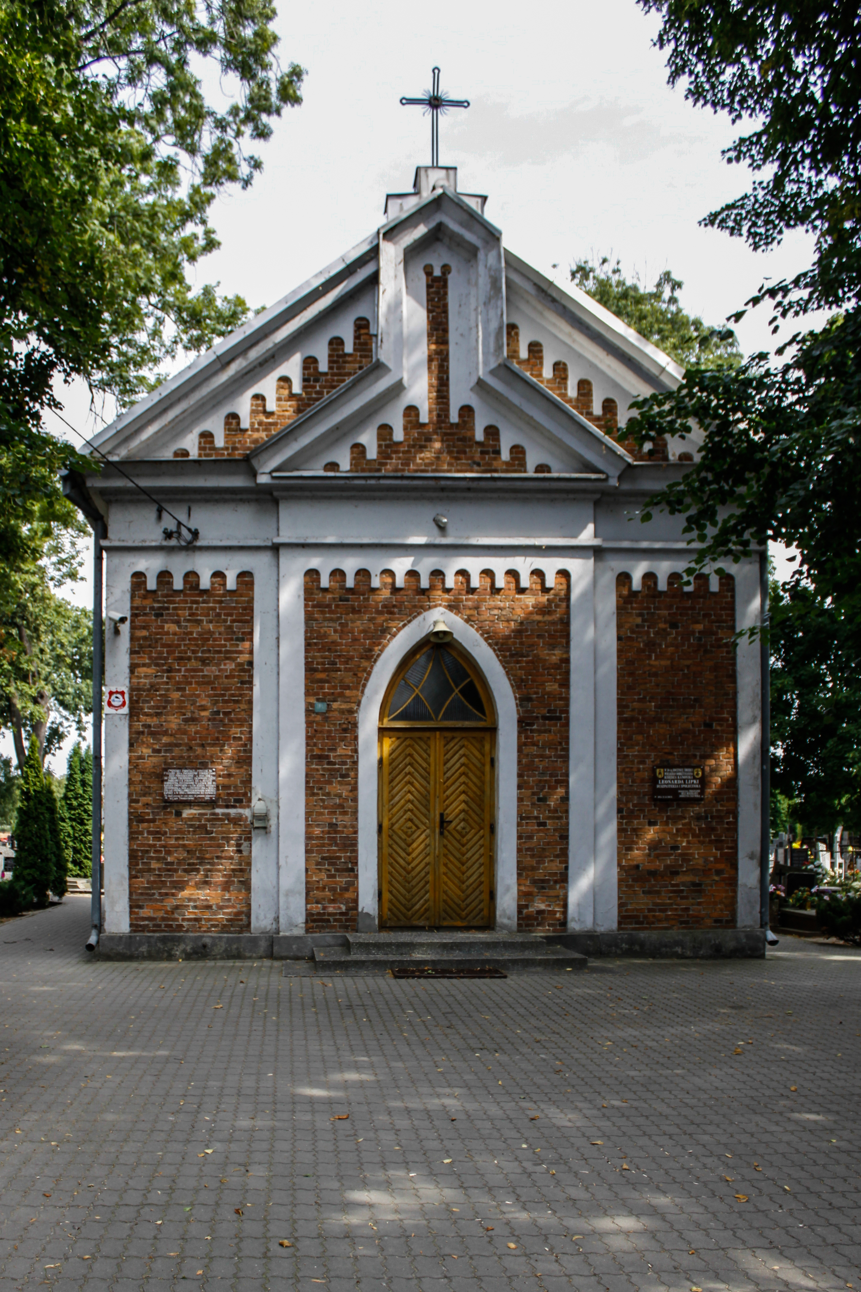 Dobrzyń nad Wisłą, kaplica, 1888